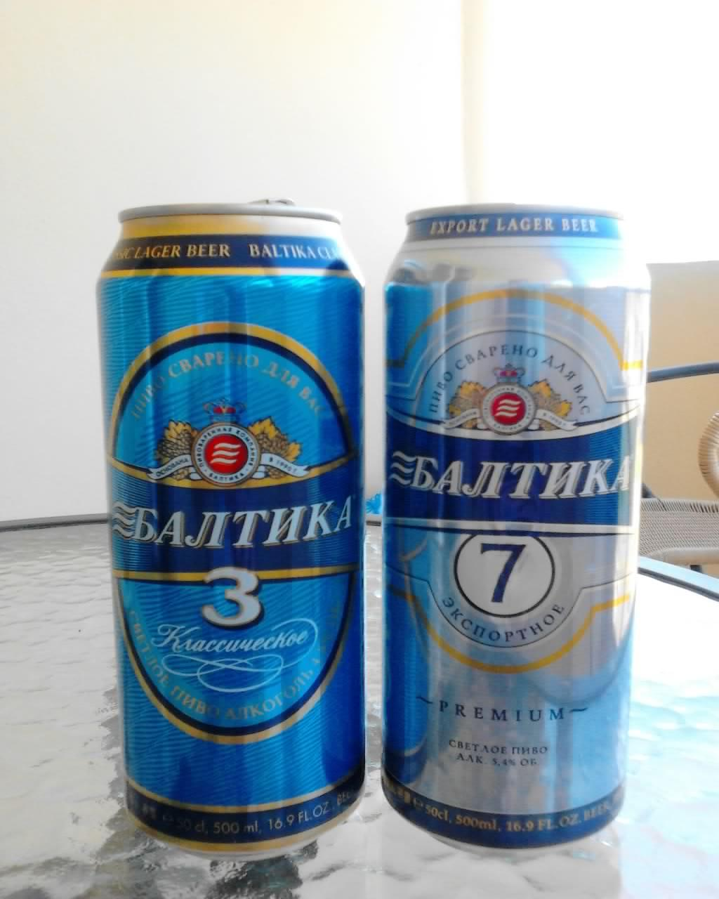 Tins of Beer Baltika